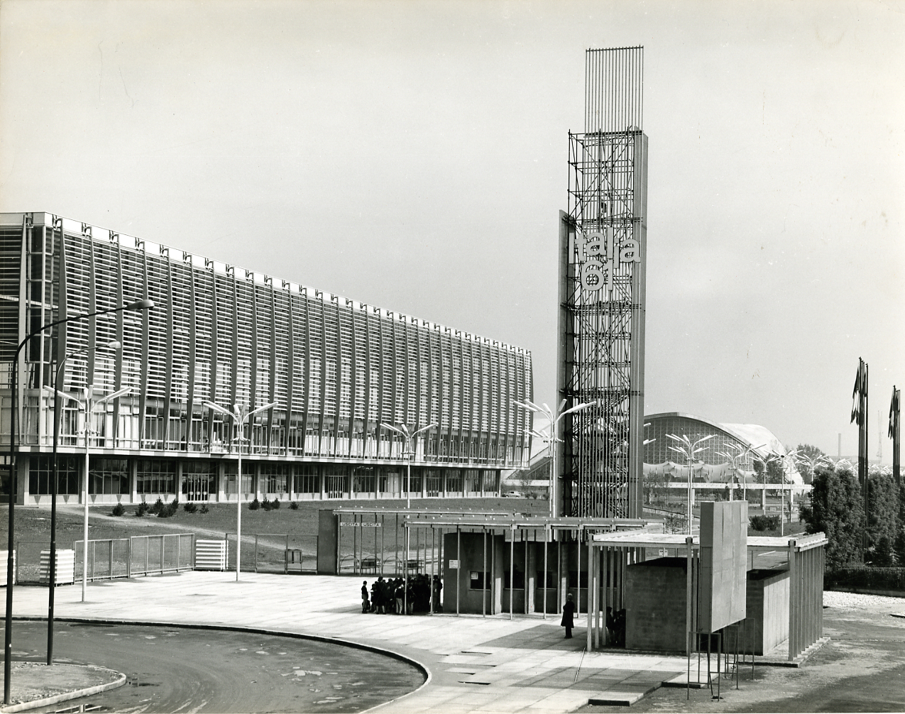 Servizio fotografico : Torino, 1961 / Paolo Monti. - Stampe: 4 : Positivo b/n, gelatina bromuro d'argento/ carta, 30x40. - ((Al verso delle stampe manoscritto numero di negativo corrispondente: 39036, 39100. Sul coperchio della scatola, manoscritto a pennarello: "Musei - Architettura Moderna ". - Occasione: Documentazione dell'esposizione internazionale Italia '61 tenutasi a Torino in occasione del centenario dell'unità d'Italia